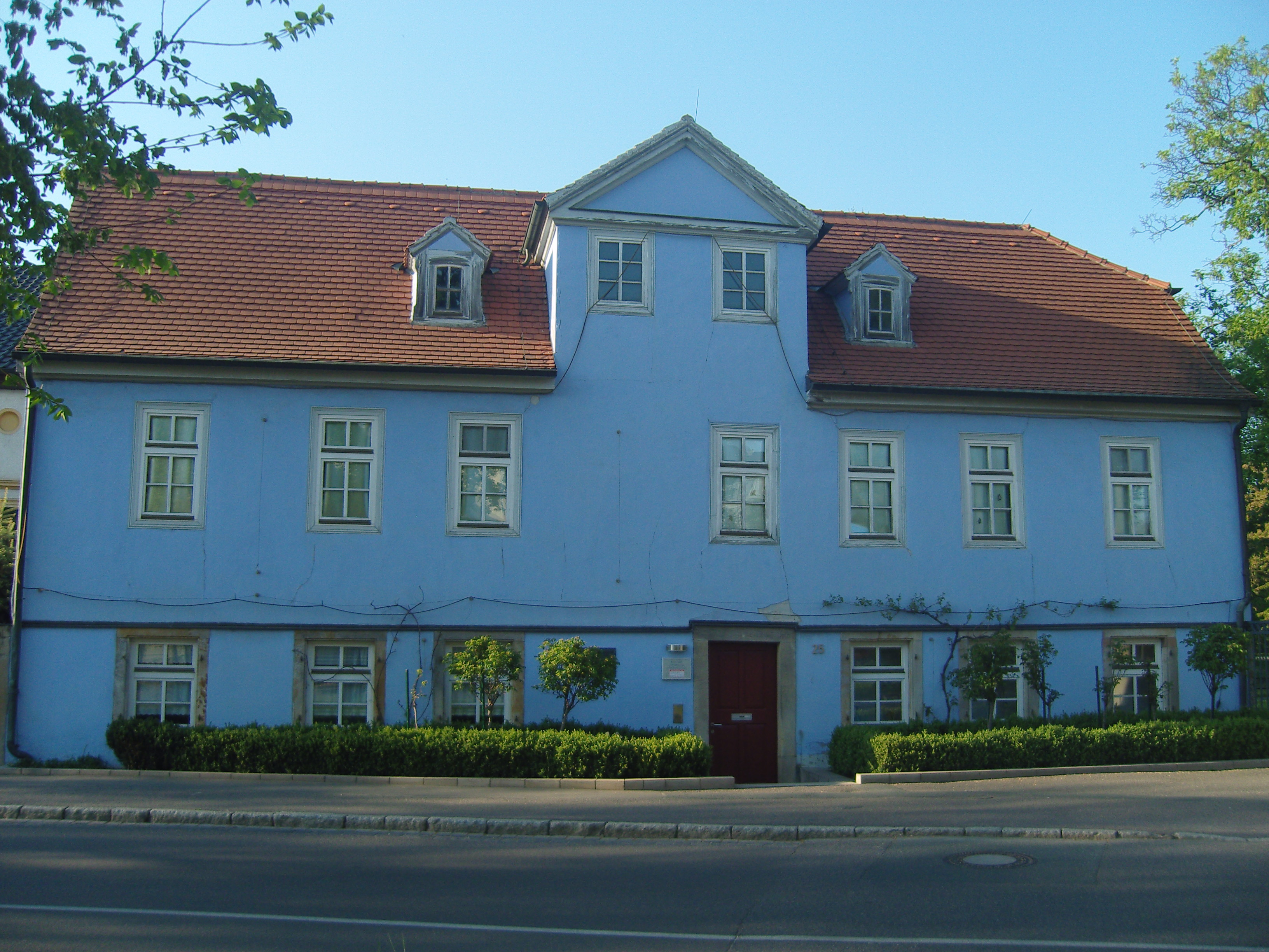 Wohnhaus der Schriftstellerin Louise von François in Weißenfels, Promenade 25